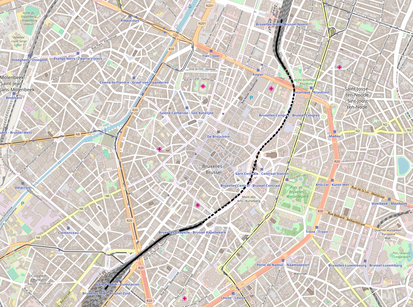 Belgian Railway Line 0, Brussel-Noord - Brussel-Zuid